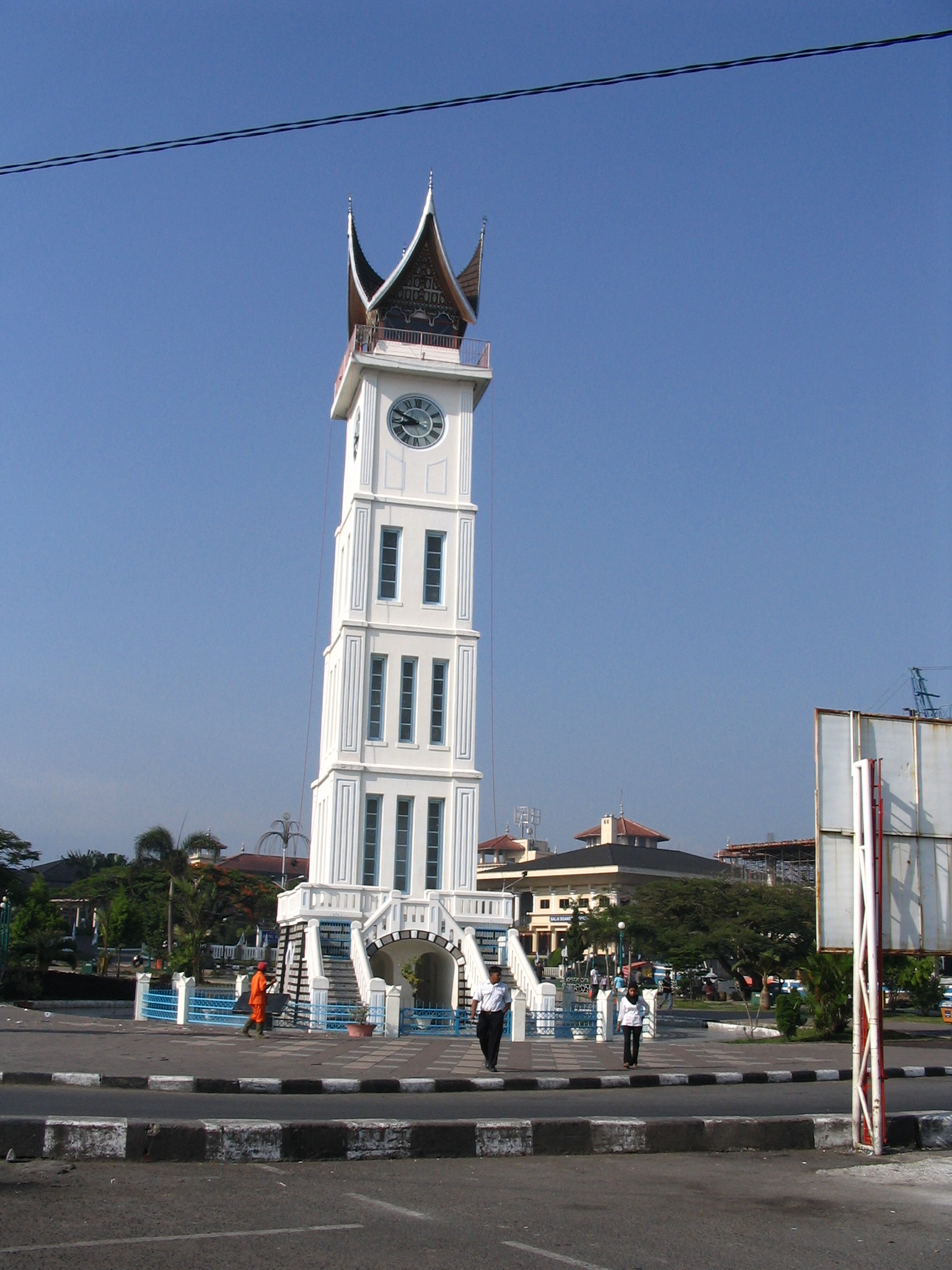 Torre del Reloj en la plaza principal de Bukittinggi, provincia de Sumatra Occidental, Indonesia.